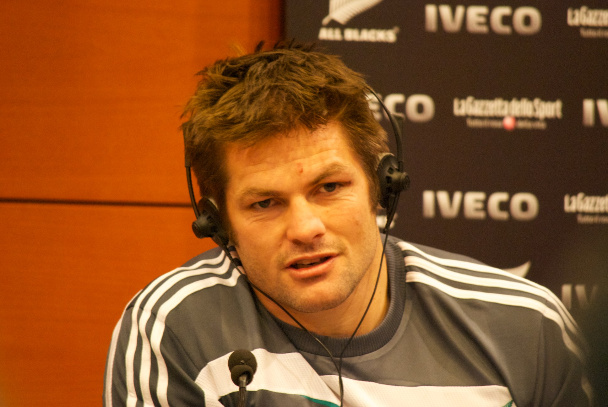 Richie McCaw, il Capitano, Miglior Giocatore dell'Anno!